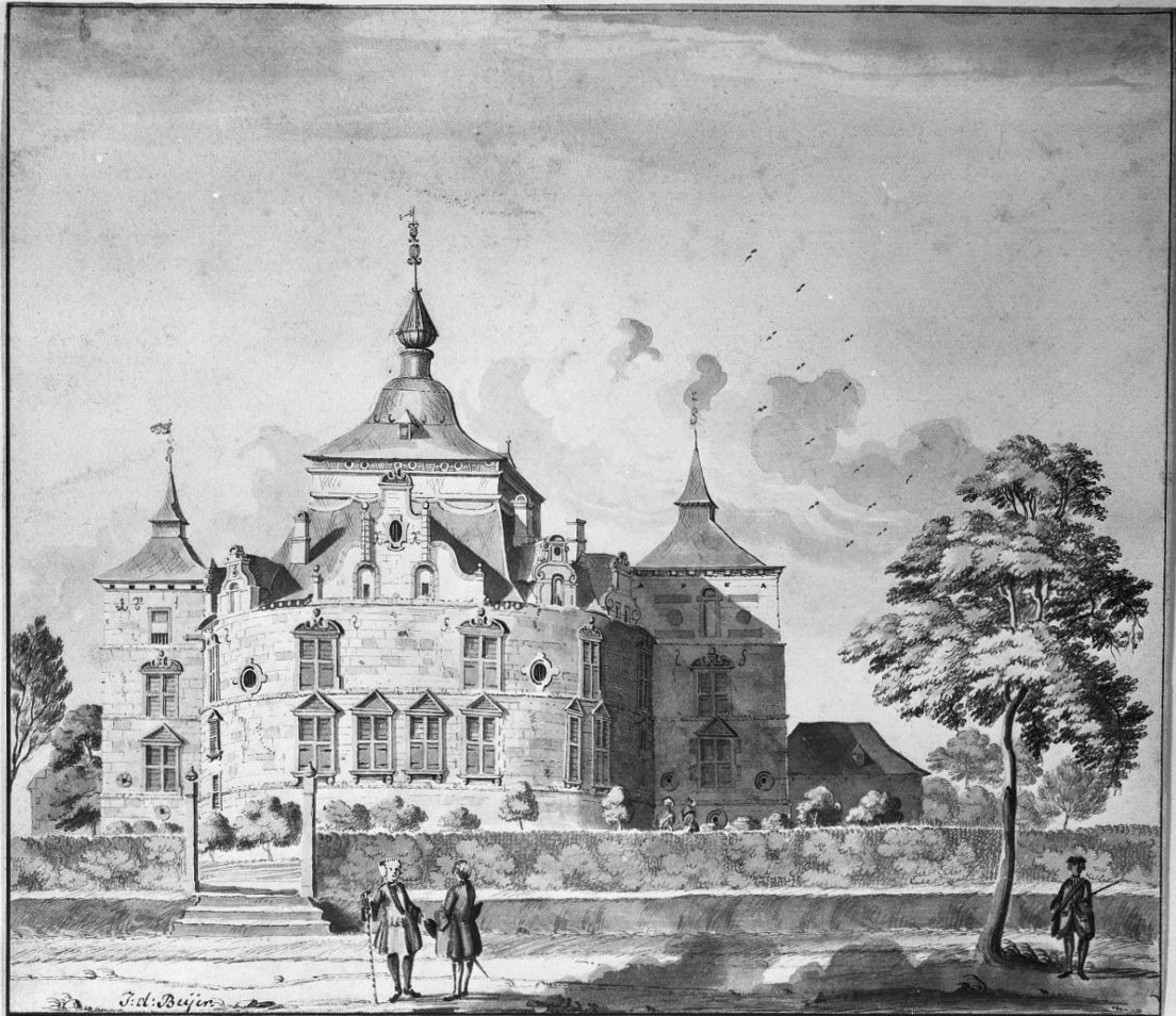 Kasteel Wiegershof: tekening J.de Beyer, Stads Archief Maastricht